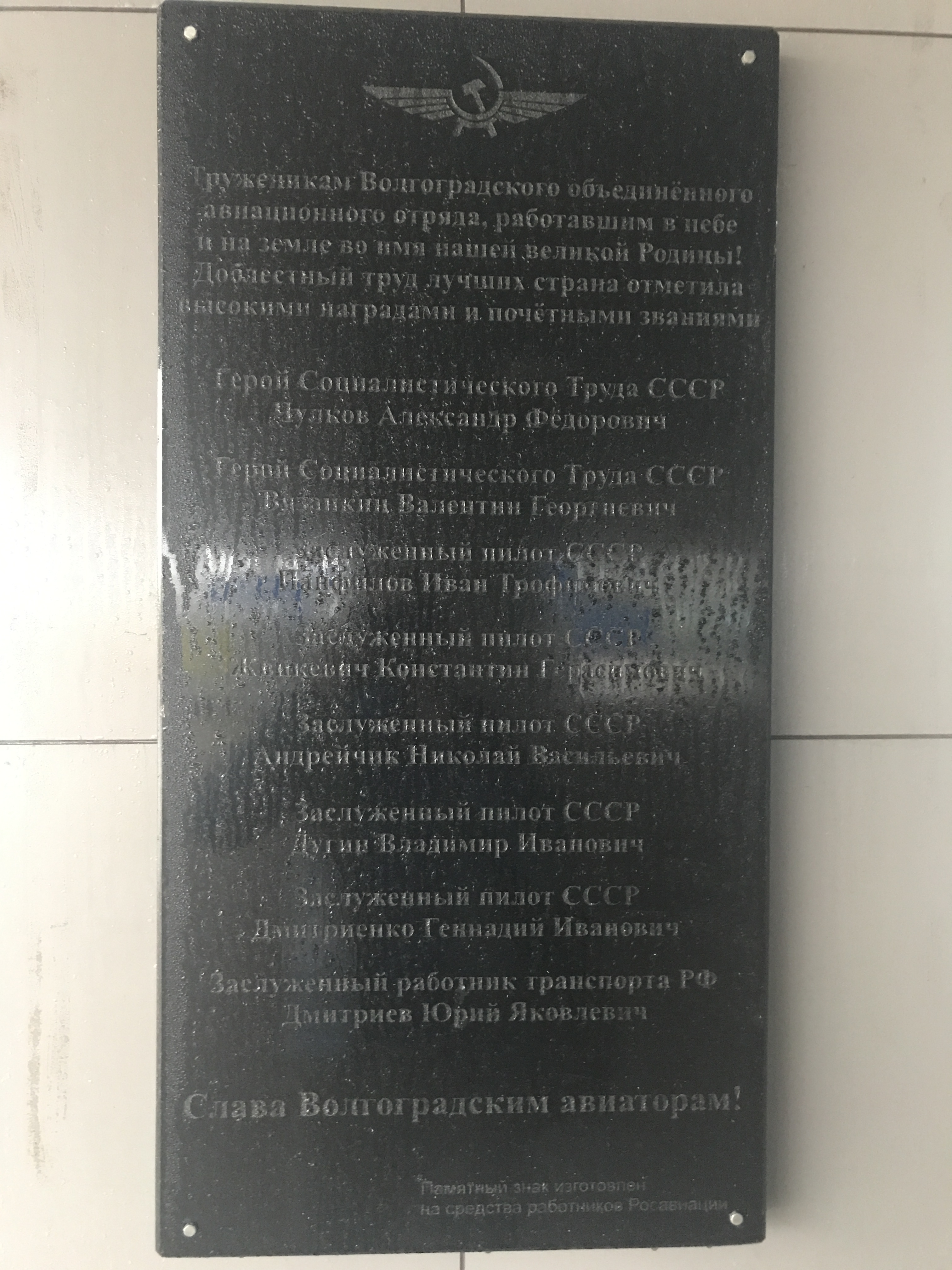 Мемориальная доска у входа в Аэропорт Гумрак посвящённая труженикам Волгоградского объединённого авиационного отряда